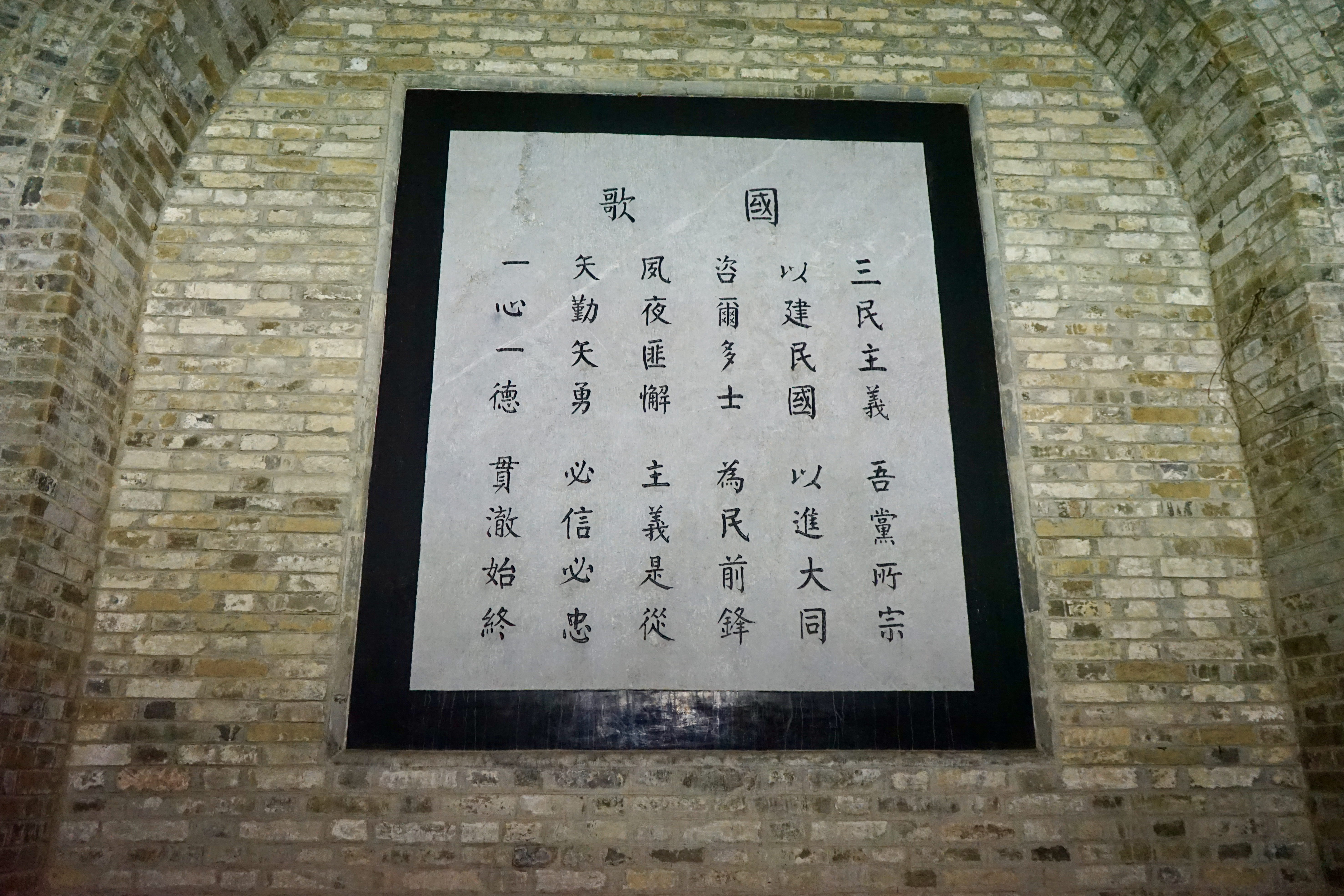 中文（中国大陆）: 辛亥革命名人蜡像馆中的中华民国国歌